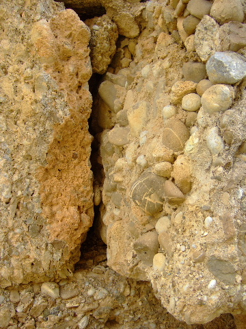 Aspendos: Bausteine aus Konglomerat